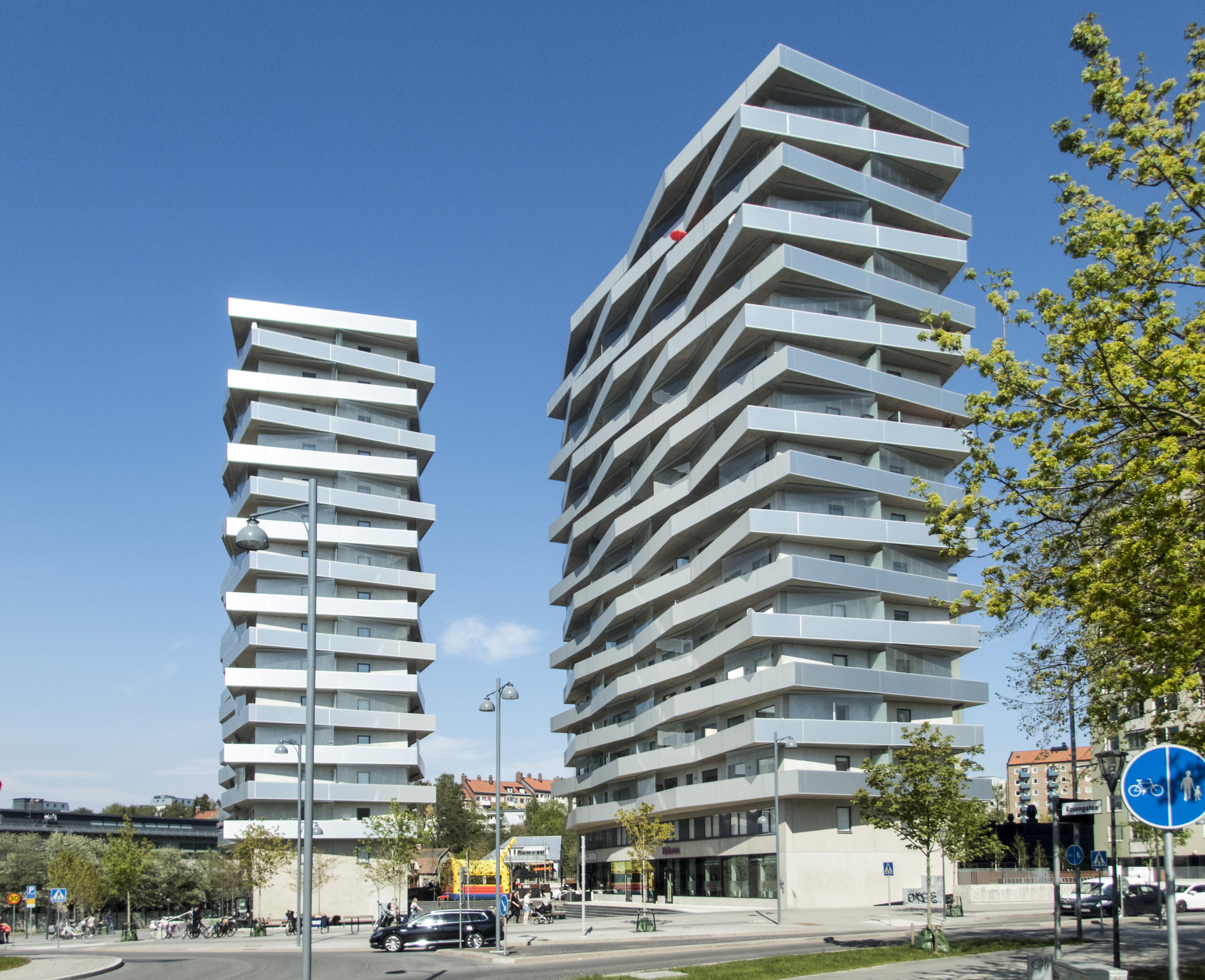 Tuletornen, Sundbyberg. Byggnadsår 2014. Arkitekter: Mats Eriksson och Tobias Nissen, Vera Arkitekter